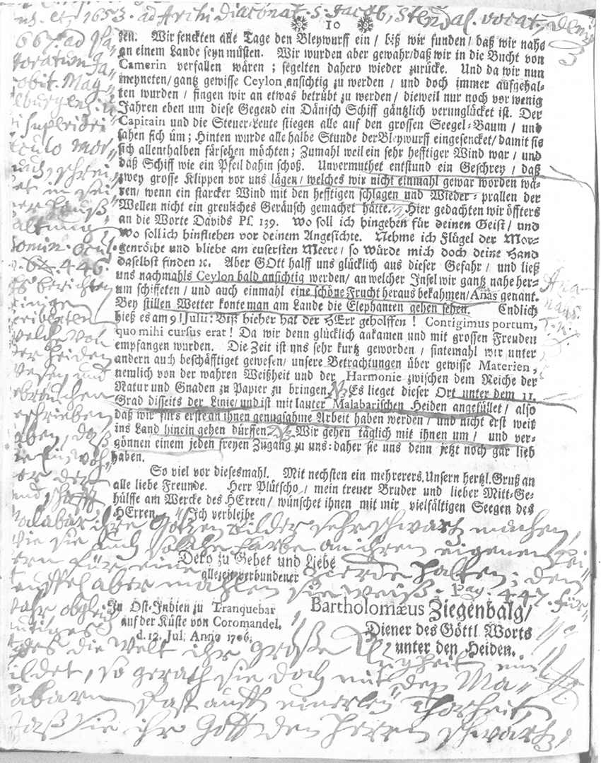 Seite aus Merckwürdige Nachricht aus Ost-Indien, Reise- und Missionsbericht, 2. Auflage 1708, Anstreichungen und Randnotizen von Heinrich Milde (1676-1739)